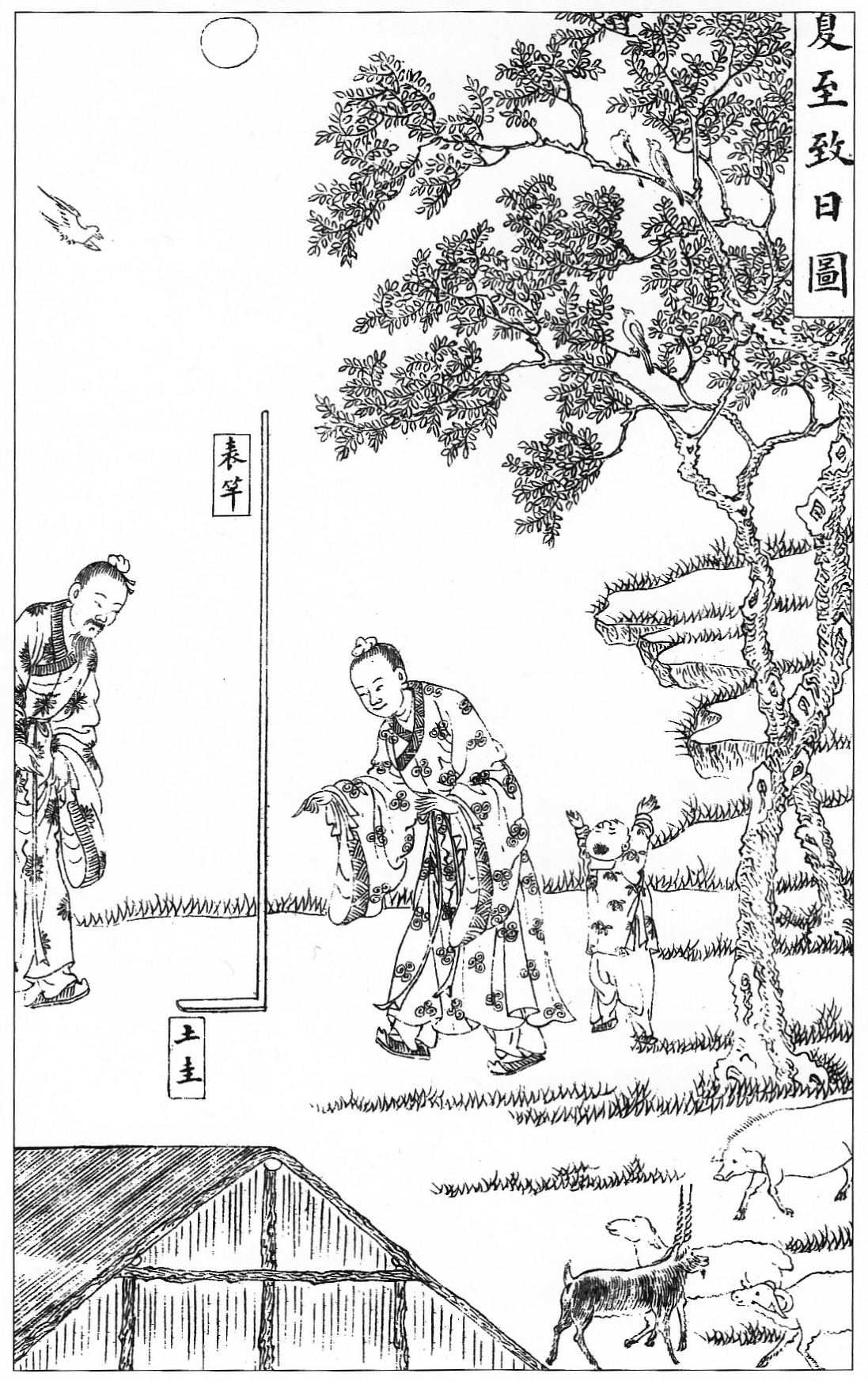 Gravure représentant les deux astronomes mythiques Xi et He observant l'ombre d'un gnomon au solstice d'été.